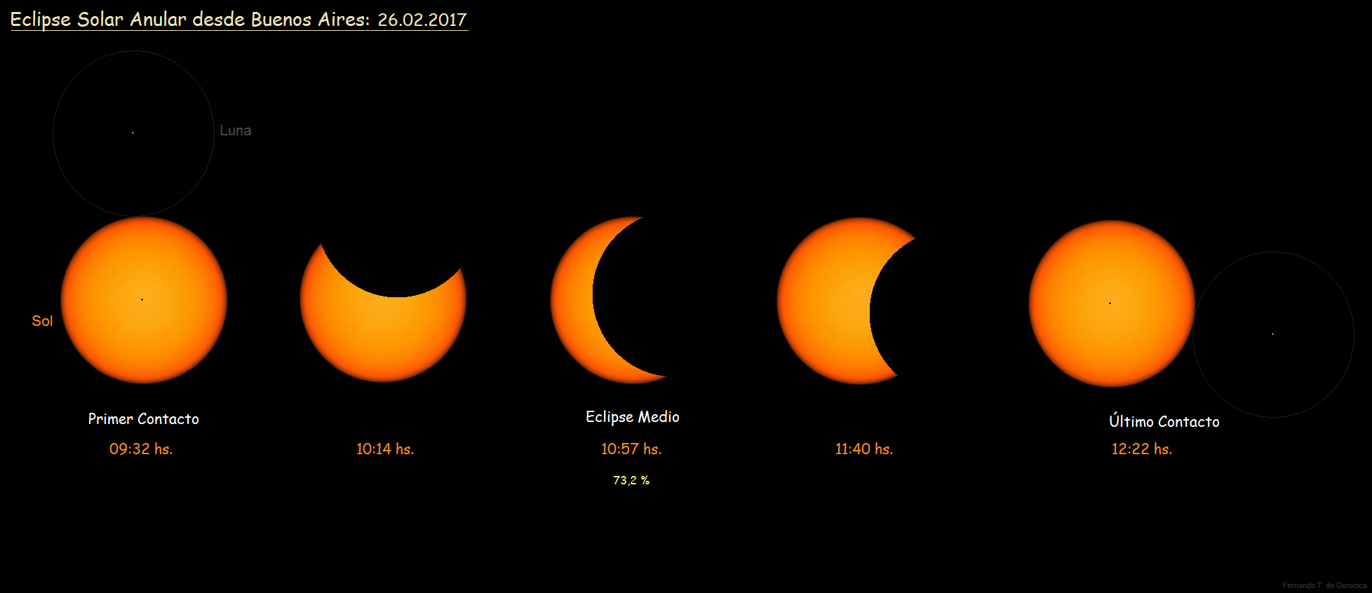 ECLIPSE SOLAR ANULAR DESDE BUENOS AIRES: El Domingo 26.02.2017 desde la ciudad autónoma de Buenos Aires se observó parcialmente el Eclipse Solar Anular.